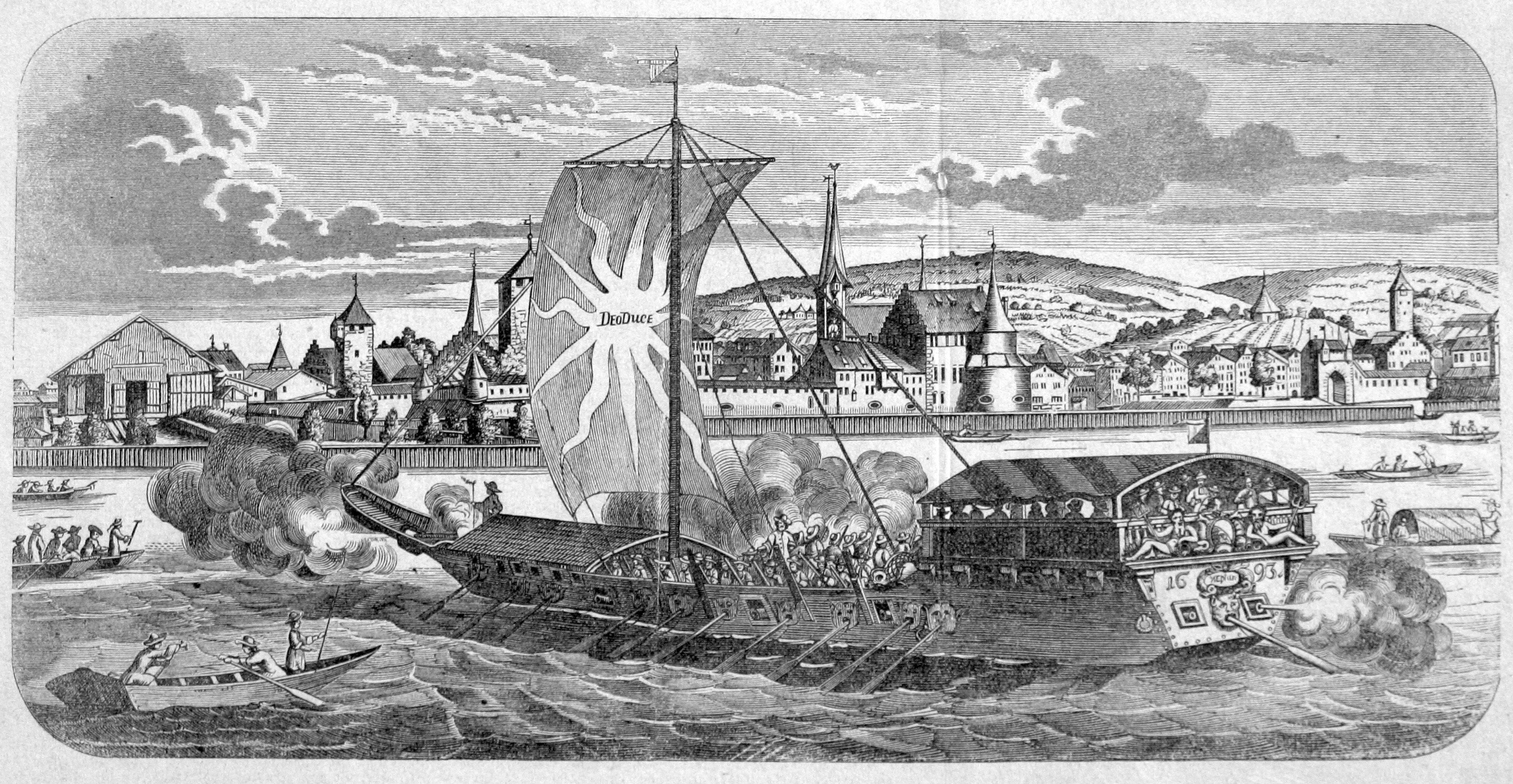 Neptun (1693) Kopie nach dem Neujahrsblatt der Constaffler und Feuerwerker im Zeughaus von Johannes Meyer aus dem Jahr 1694, detaillerte Beschreibung siehe Scan vom Buch